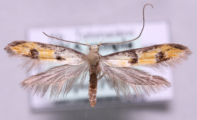 Heinemannia laspeyrella